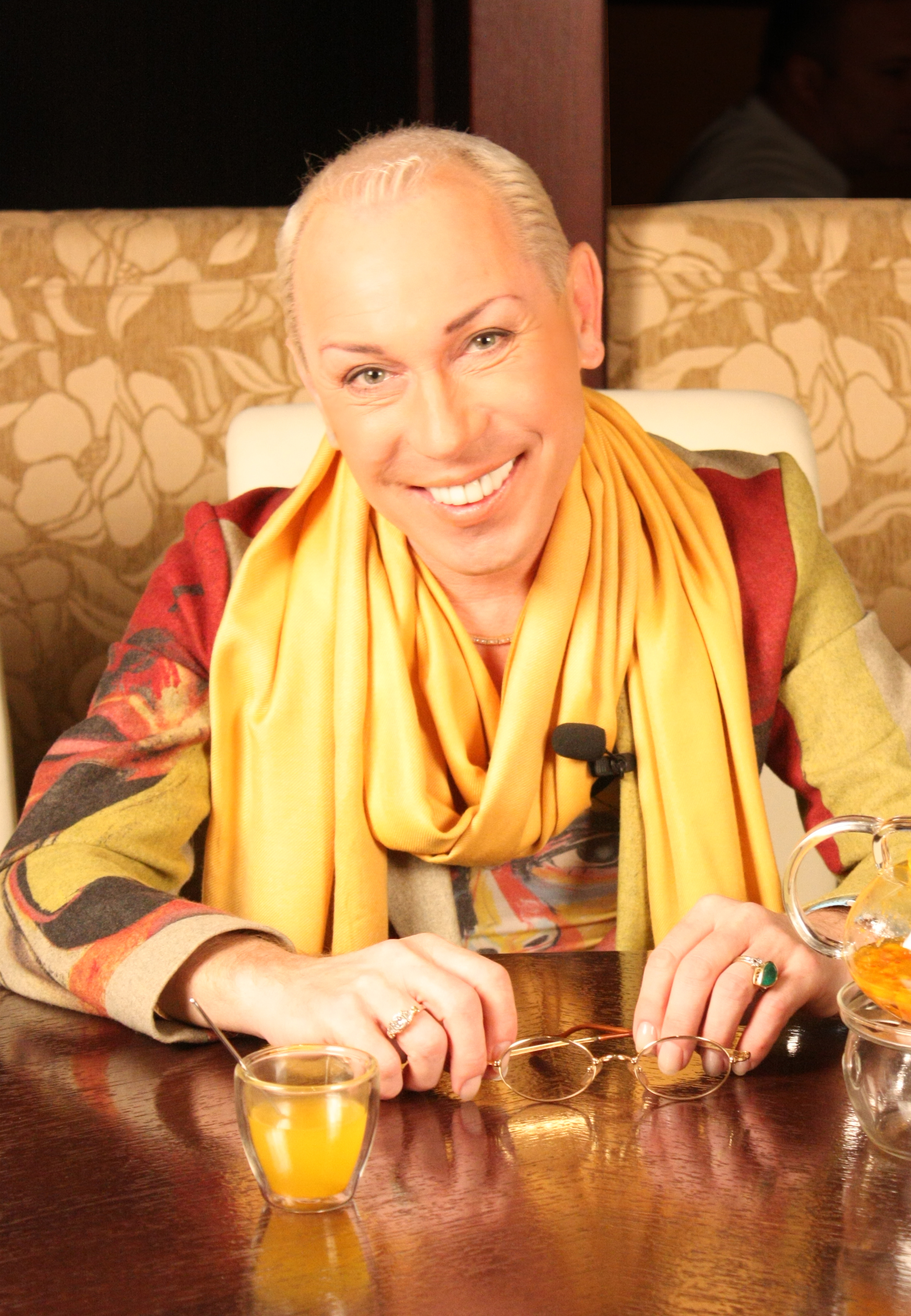 В момент интервью, в одном из столичных кафе